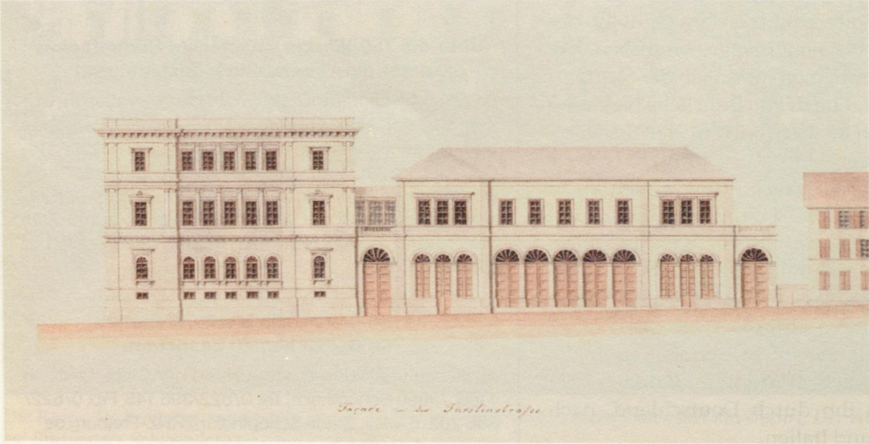 Ludwig Friedrich Gaab: Façade an der Fürstenstraße. Entwurf für das Kronprinzenpalais in Stuttgart, 1845.